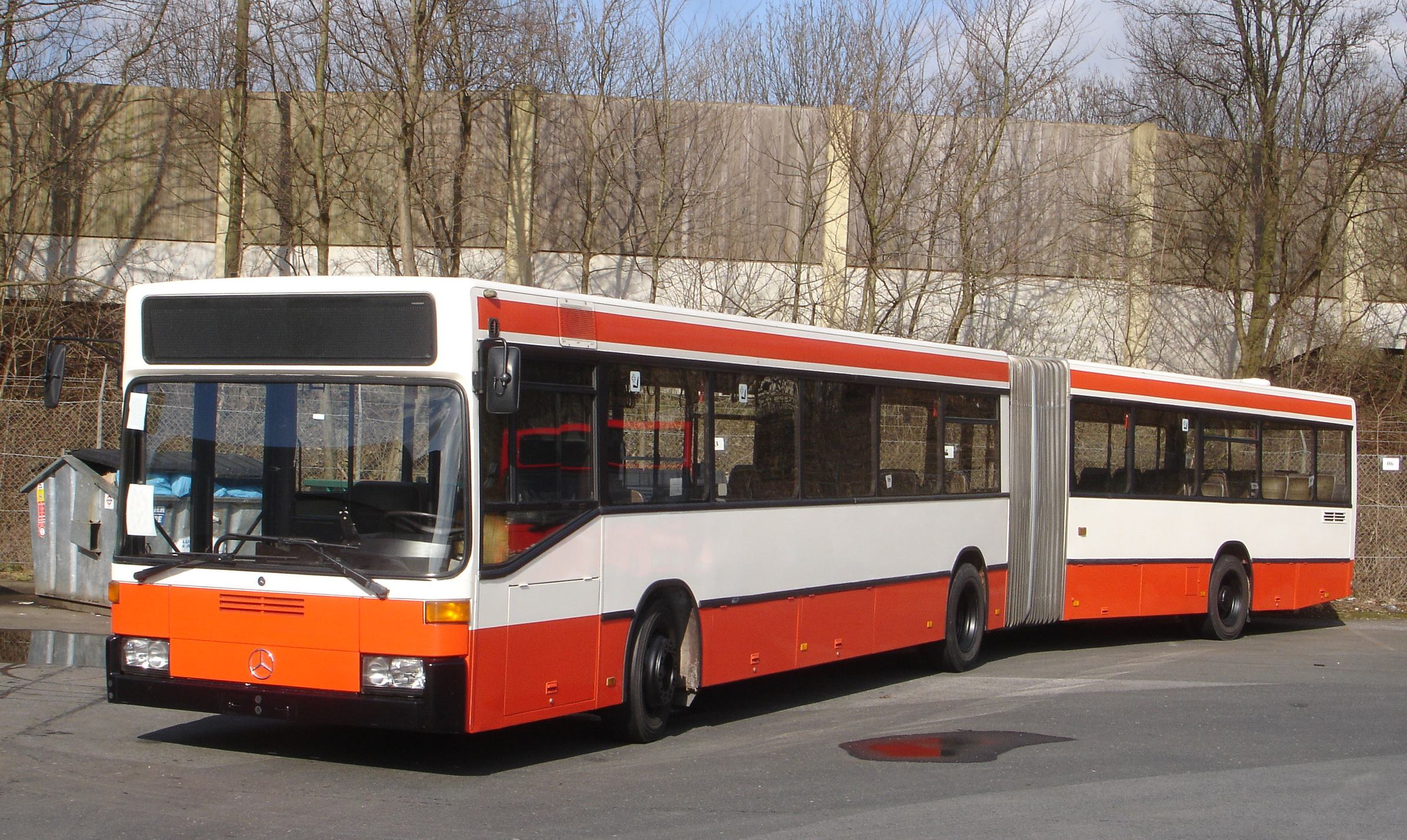 Mercedes-Benz 405GN 1 Gelenkbus